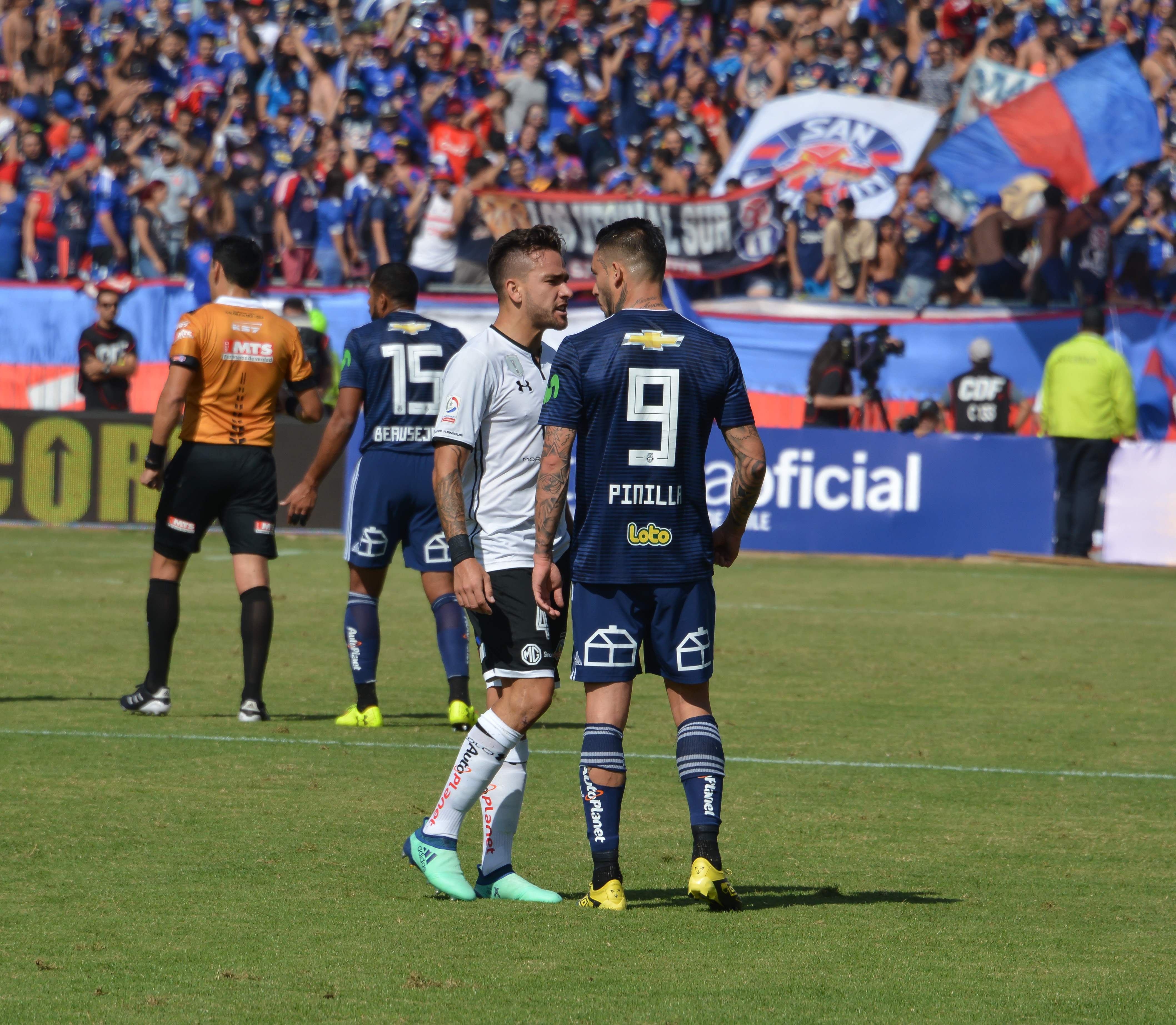 Universidad de Chile v Colo-Colo, Estadio Nacional, Santiago, Chile.